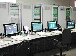 Программно-технический комплекс (ПТК) КРУГ-2000